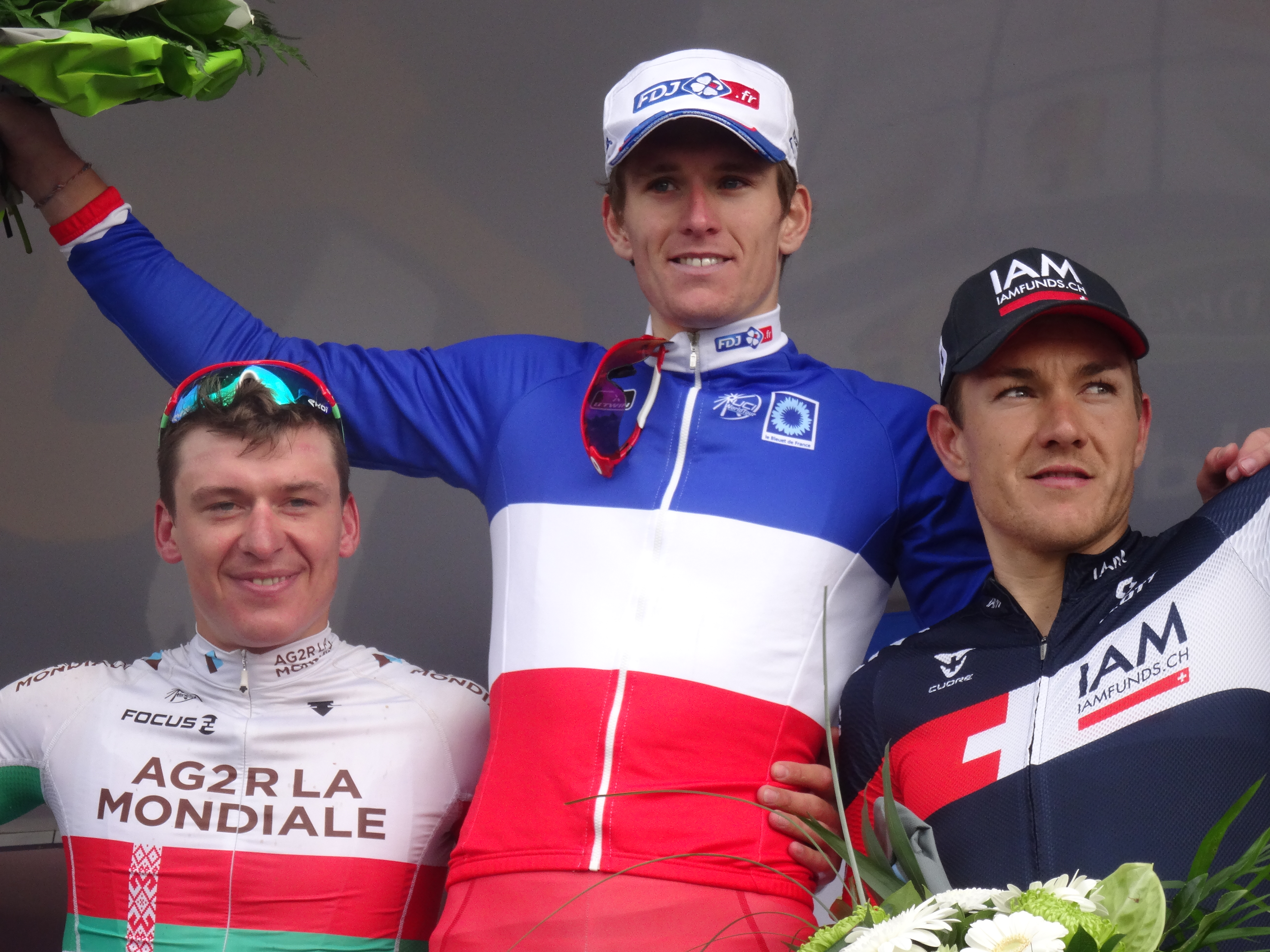 Reportage photographique réalisé le dimanche 21 septembre à l'occasion du départ et de l'arrivée du Grand Prix d'Isbergues 2014 à Isbergues, Nord-Pas-de-Calais, France.